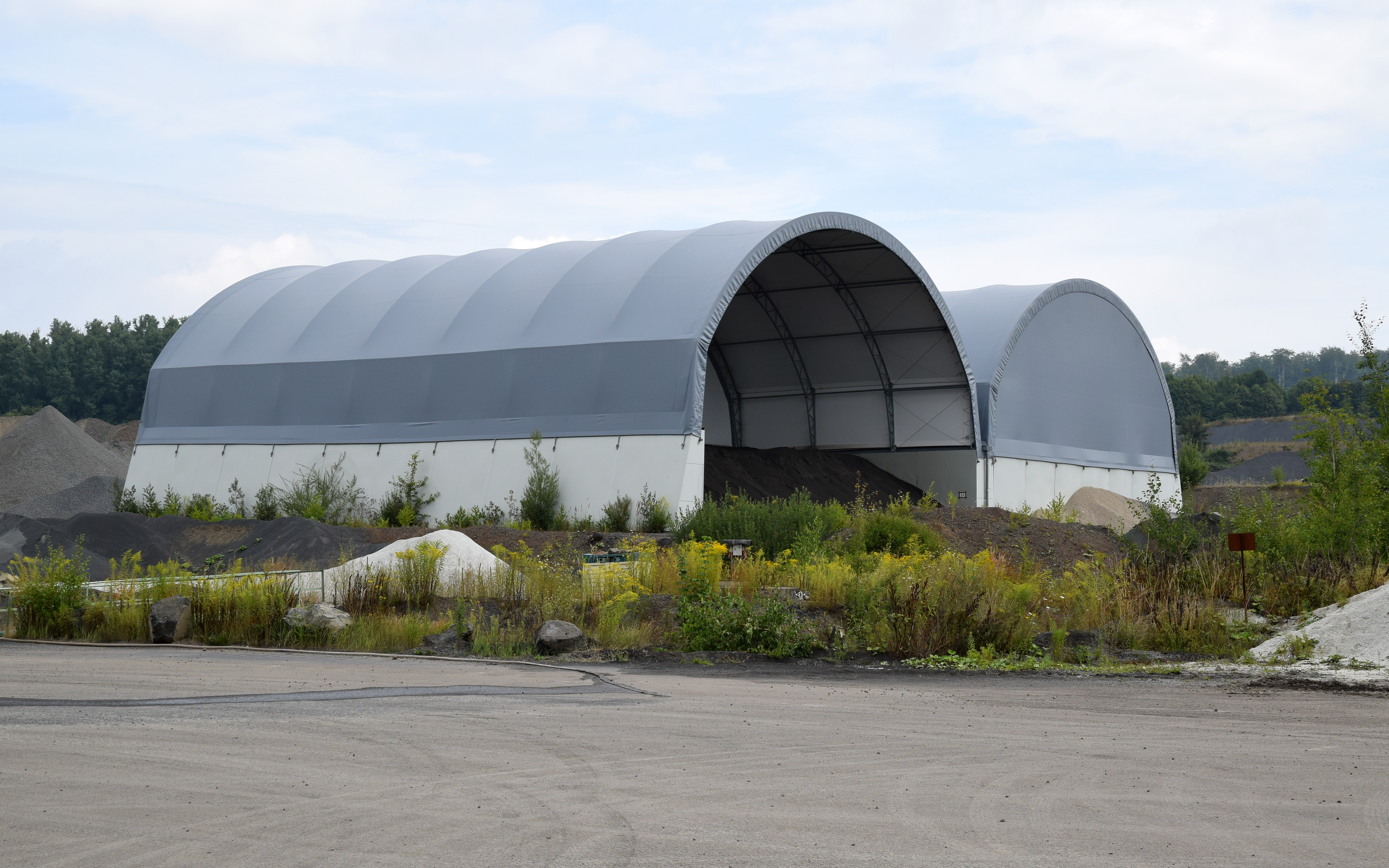 Lagerhallen des Johannes-Nickel-Hartbasaltwerks in Dreihausen (Ebsdorfergrund)